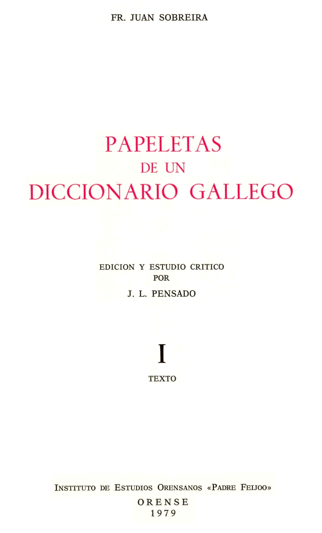 Fr. Juan SobreiraPapeletas de un diccionario gallegoedición y estudio crítico por J. L. PensadoItextoInstituto de Estudios Orensanos «Padre Feijoo»ORENSE1979